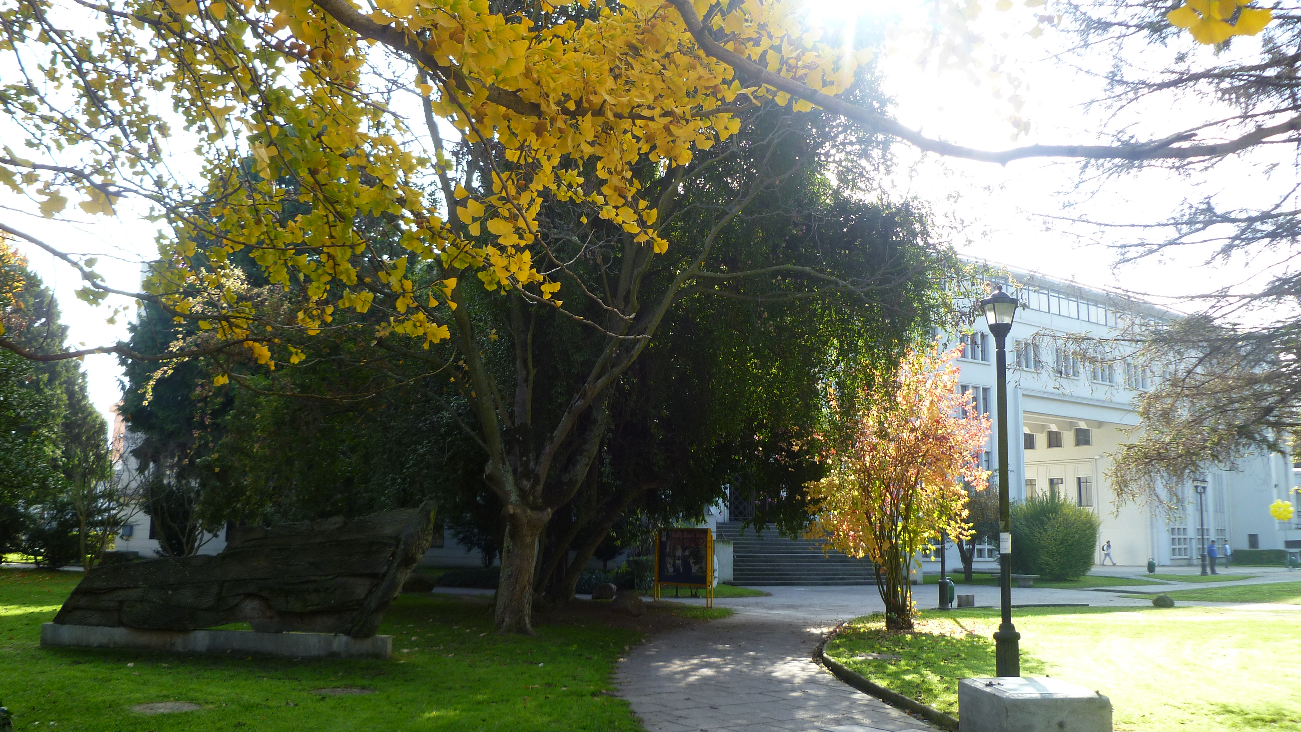 Paisajes con arboles udec